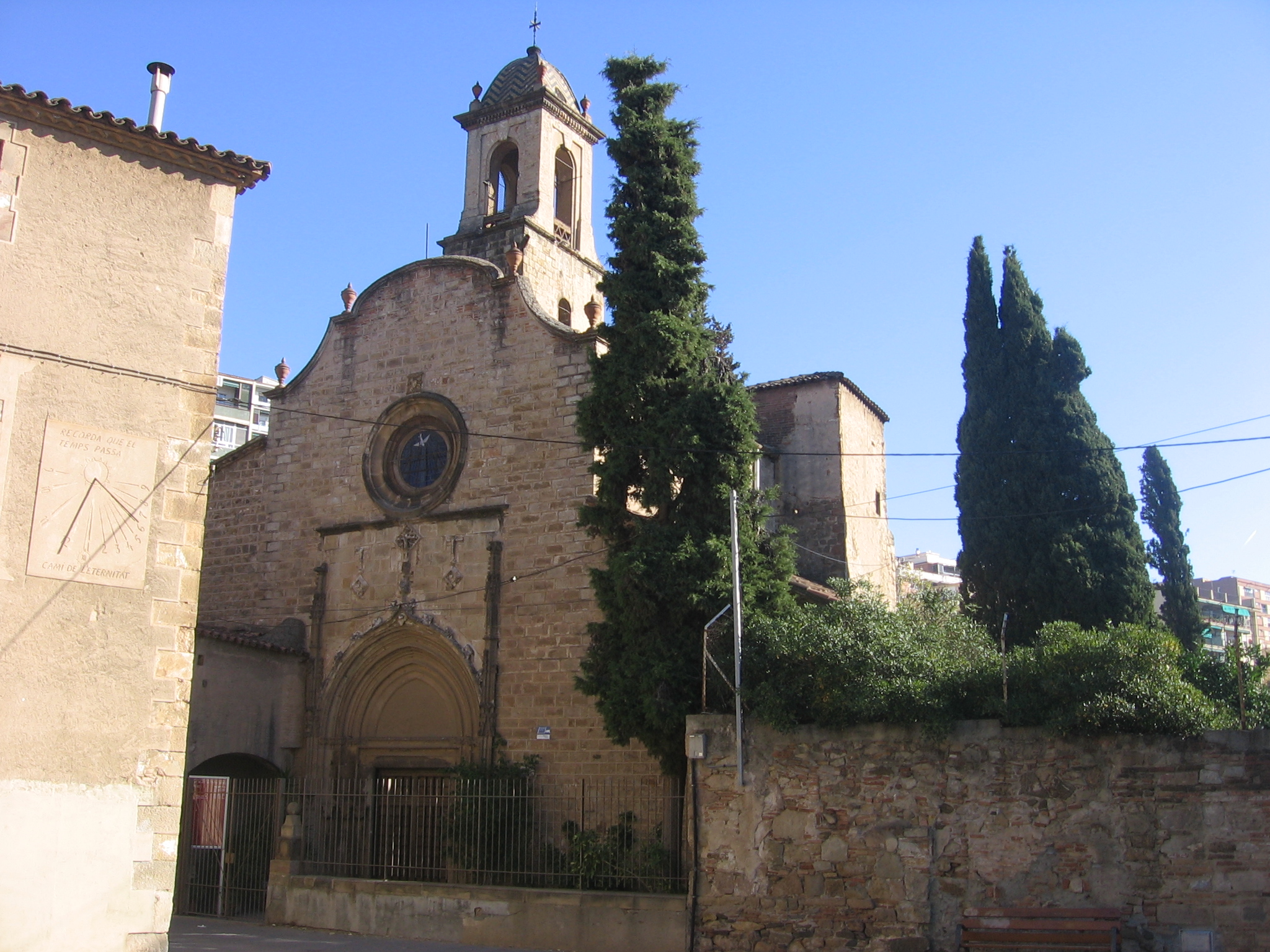 Iglesia de Sant Martí de Provençals.